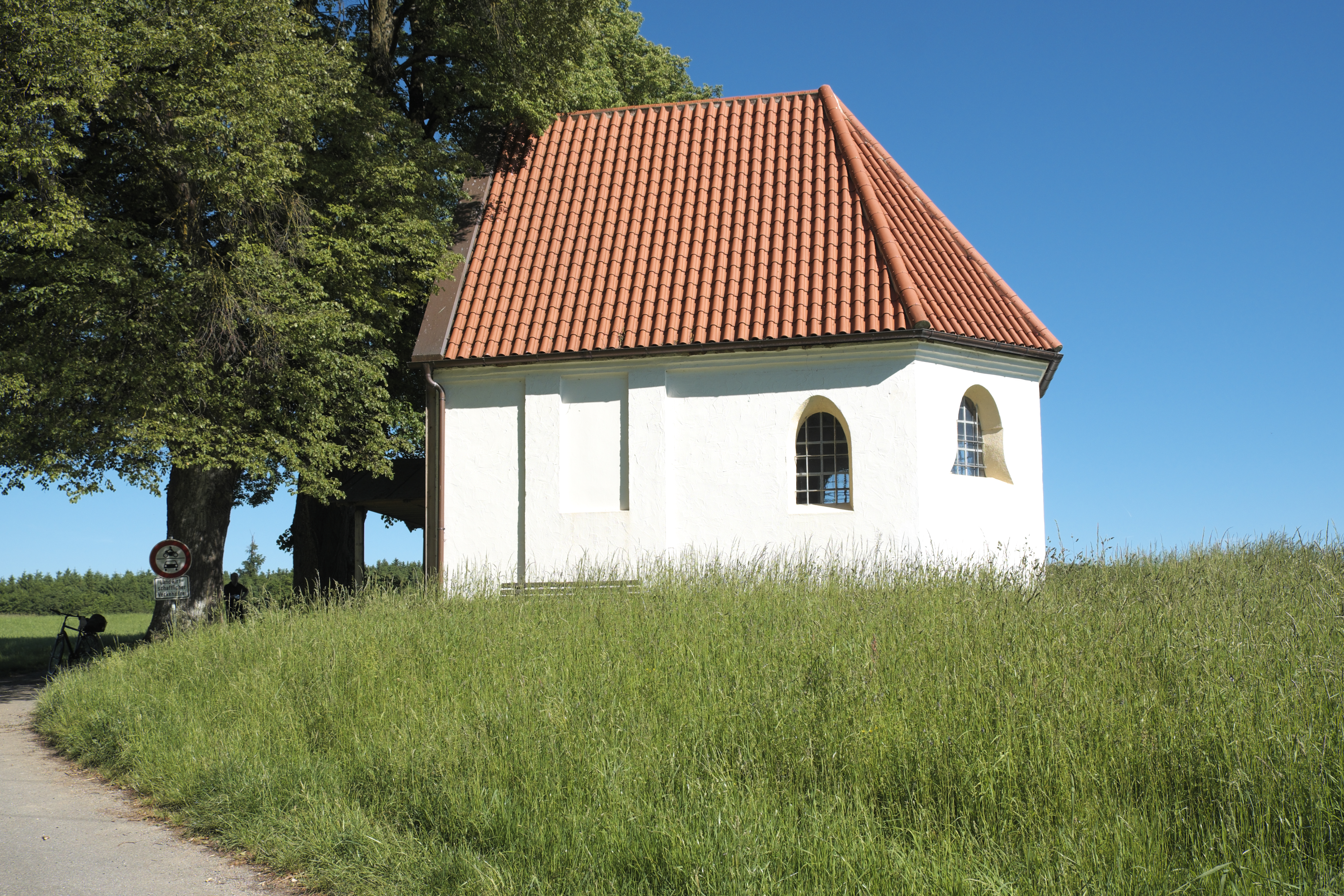 Wallfahrtskapelle St. Laurentius in Unterbrunn (Gauting) im Landkreis Starnberg (Bayern/Deutschland)